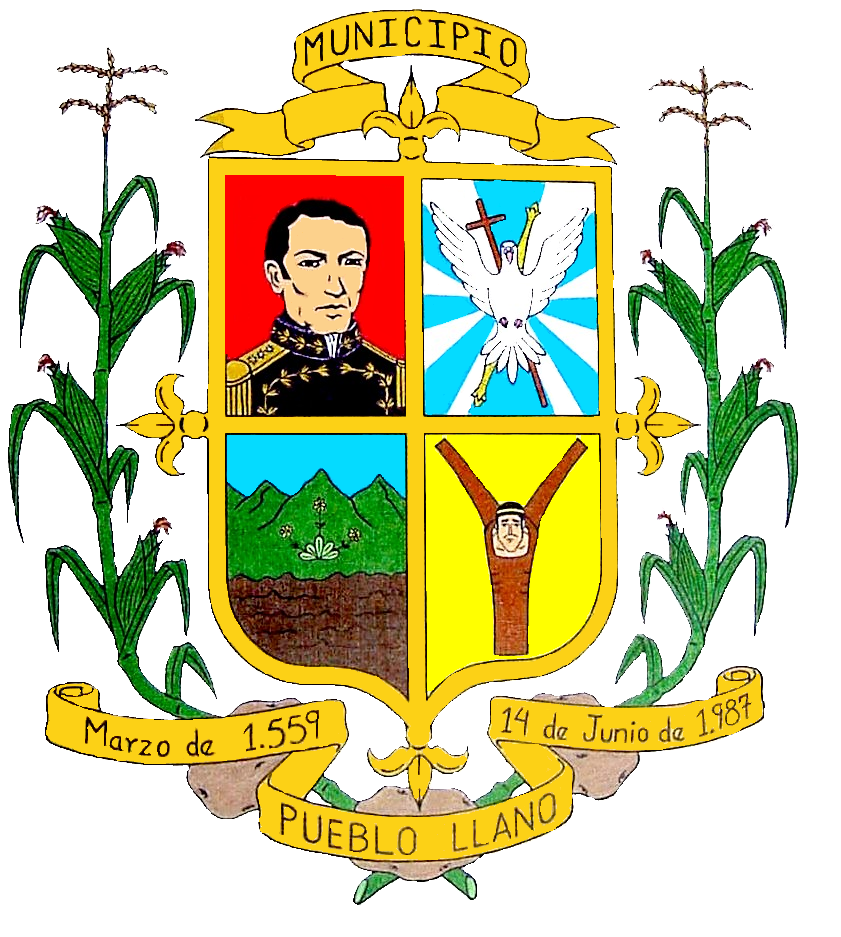 Escudo del municipio Pueblo Llano. Estado Mérida. Venezuela